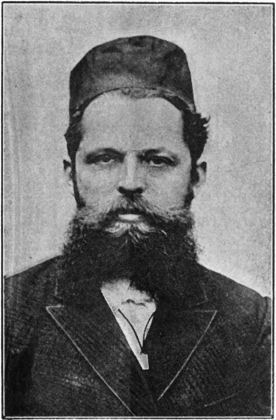 היצהרי: ספר תולדות המטיף הלאמי: צבי הירש מאסליאנסקי, והרבה מכתבים, מאמרים, מליצות ושירים מאת אנשי השם, המספרים בשבחו ופעולתו על במות ישראל, יצא לאור על ידי מכבדיו ומוקיריו משה זאבלאצקי ויוסף מזל, מנצ'סטר: דפ' יוסף מזל, 1895.